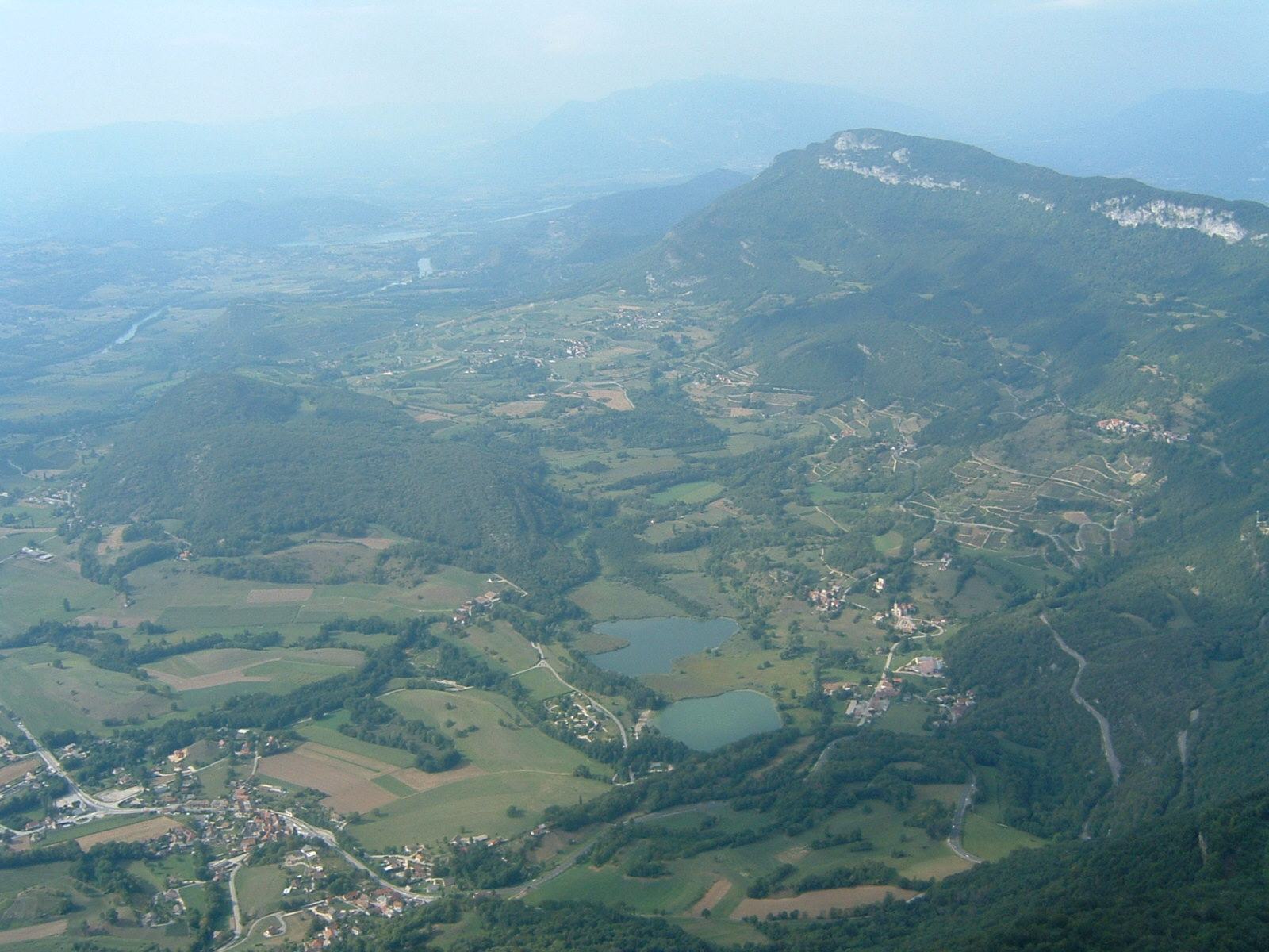 Saint-Jean-de-Chevelu vu de la Dent du Chat.